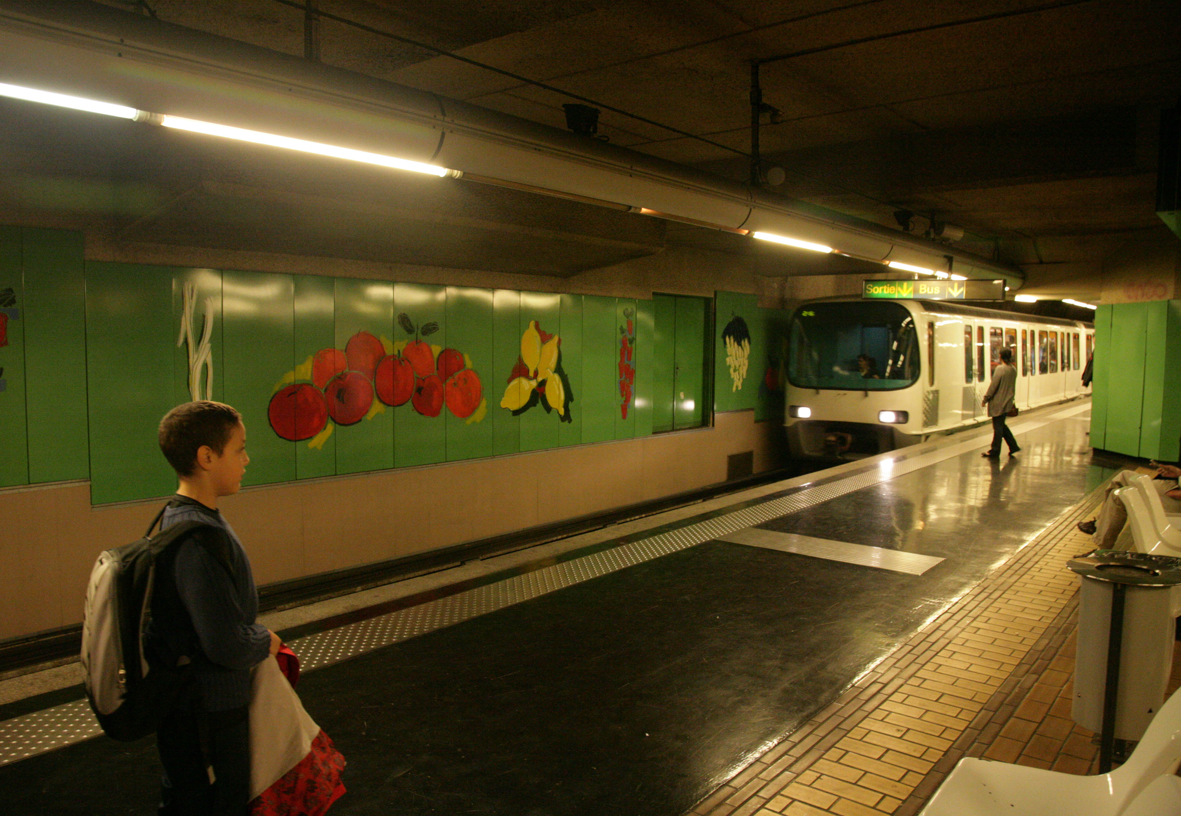 Rame de métro arrivant à la station Notre Dame du Mont à Marseille